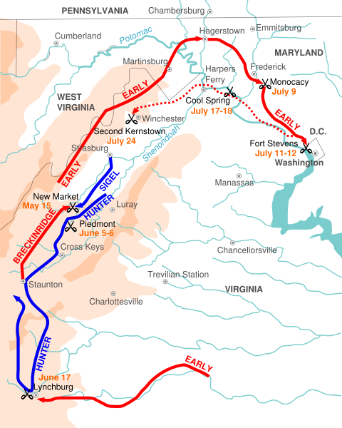 Første halvdel af Shenandoah kampagnen i 1864